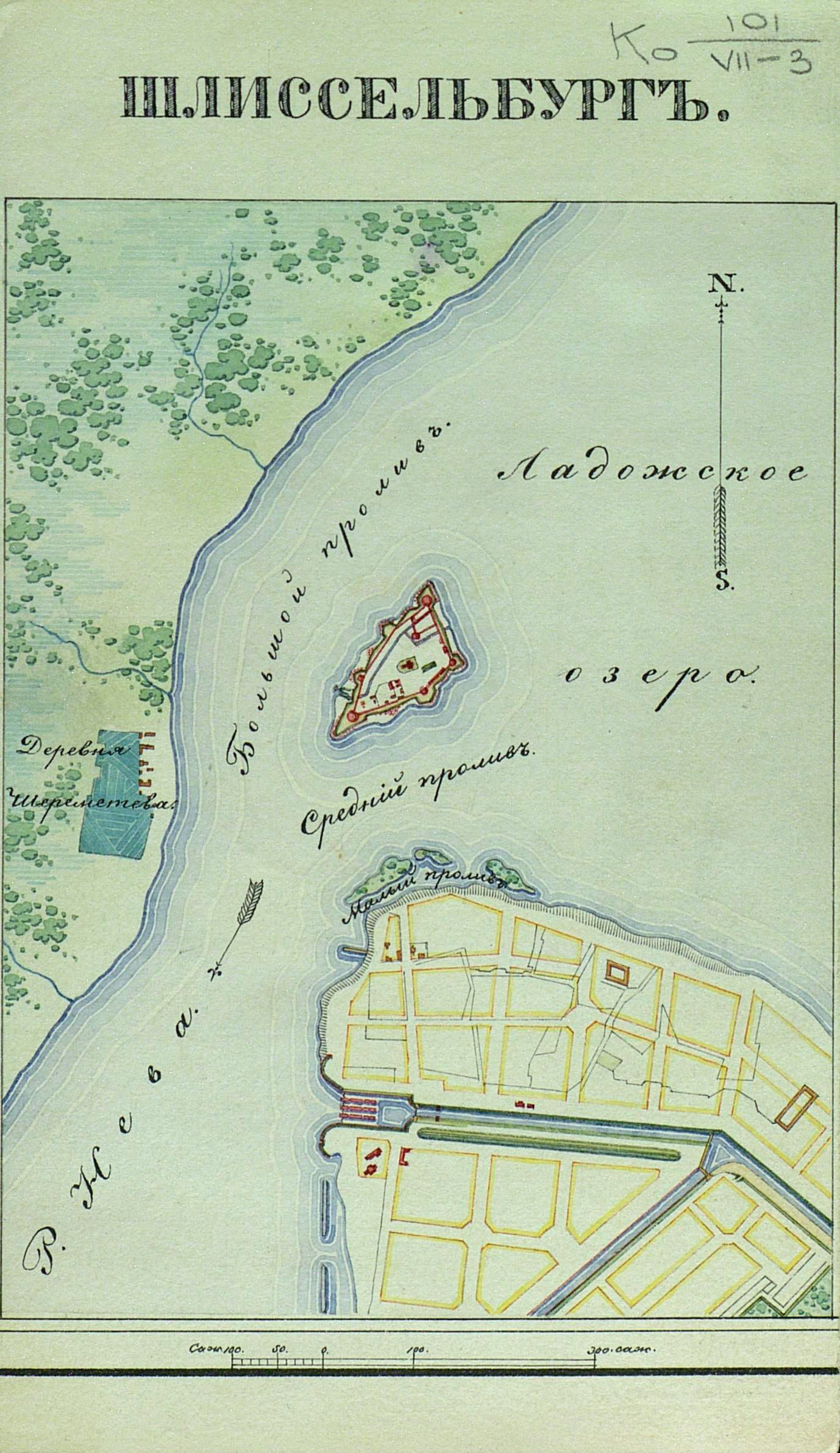 Крепость Шлиссельбург из "Атласа крепостей Российской империи"